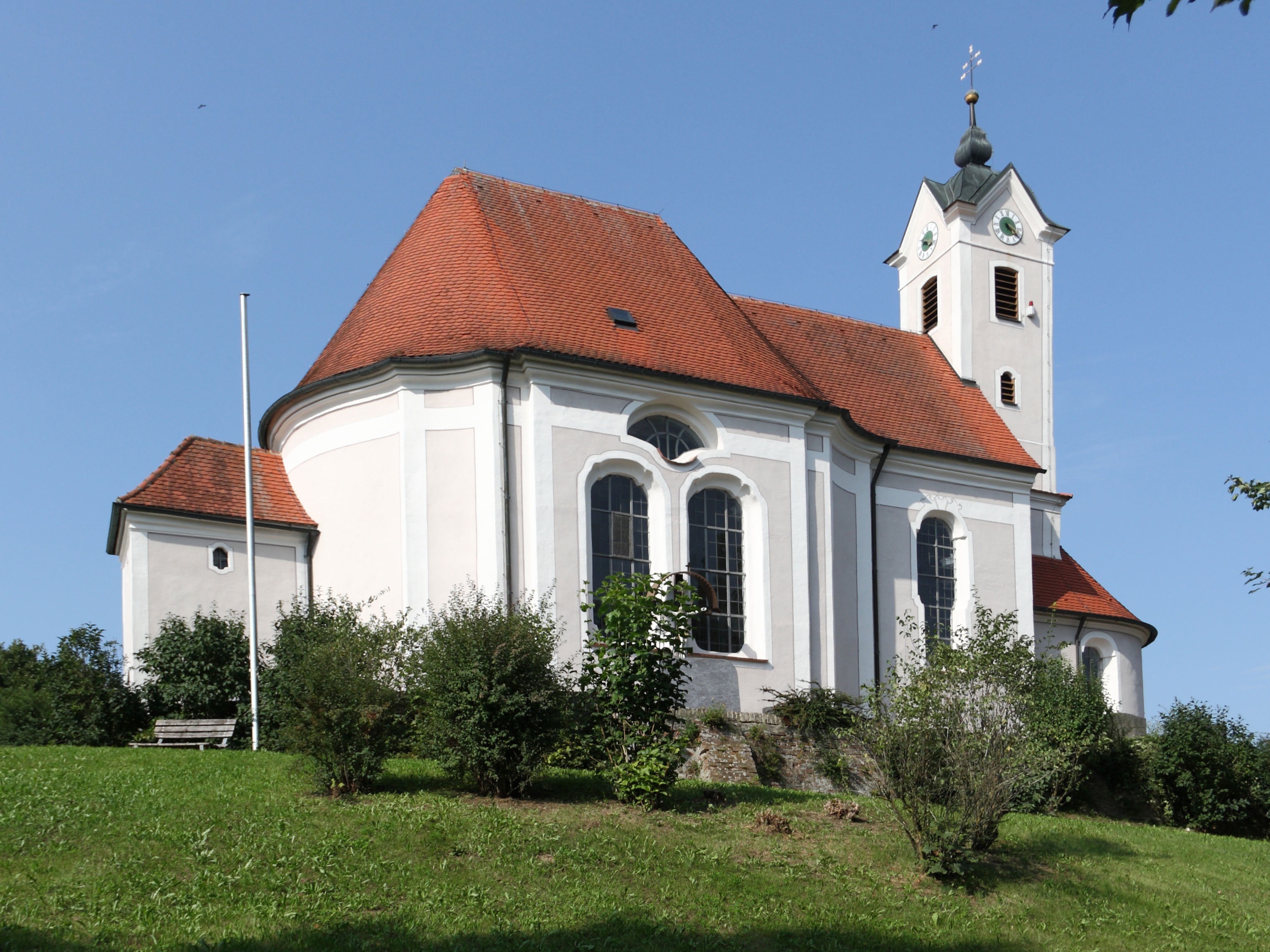 Kath. Filialkirche St. Nikolaus in Hammerstetten, Gemeinde Kammeltal; Ansicht von Südwesten